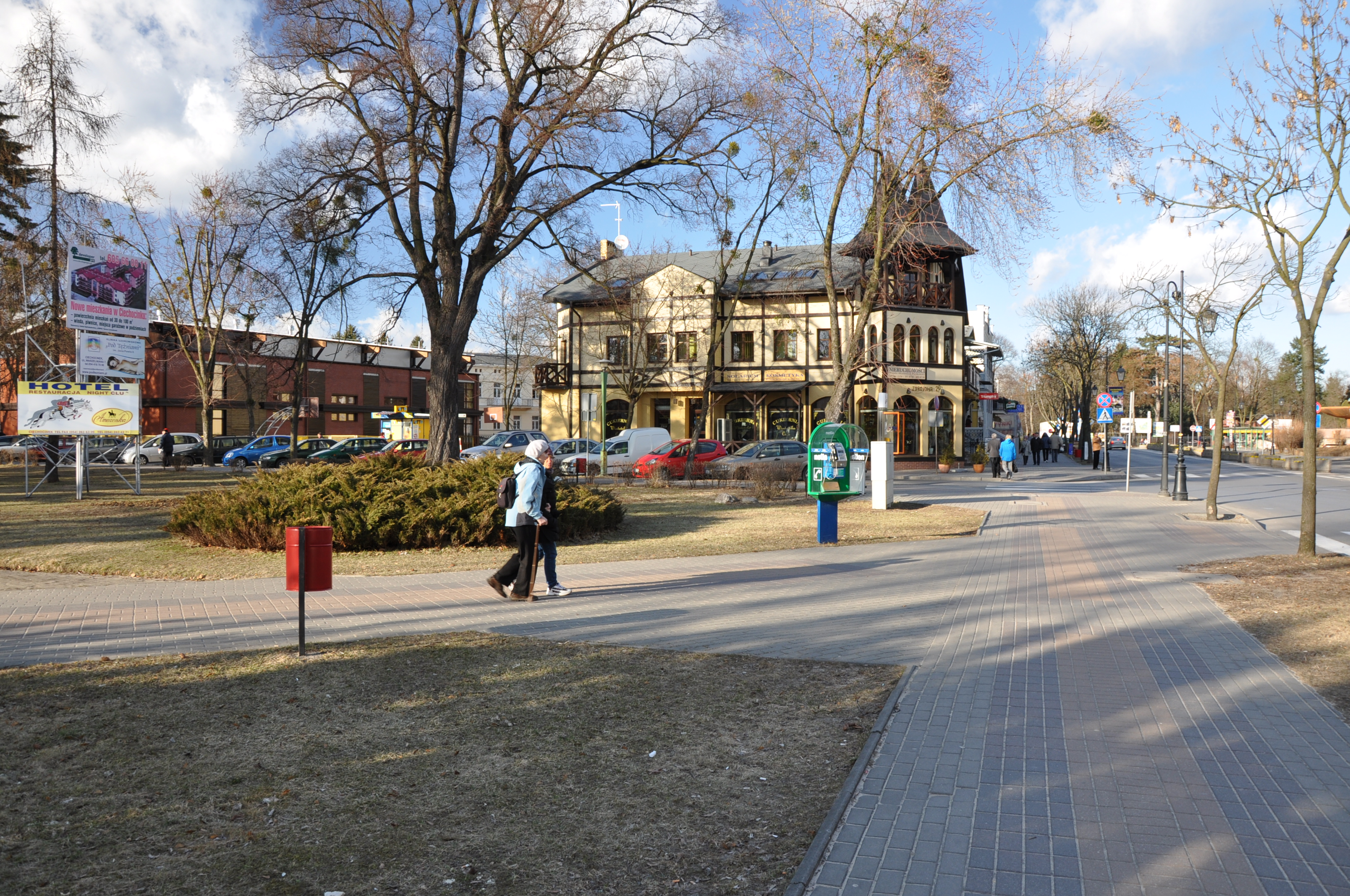 Ciechocinek wiosną.